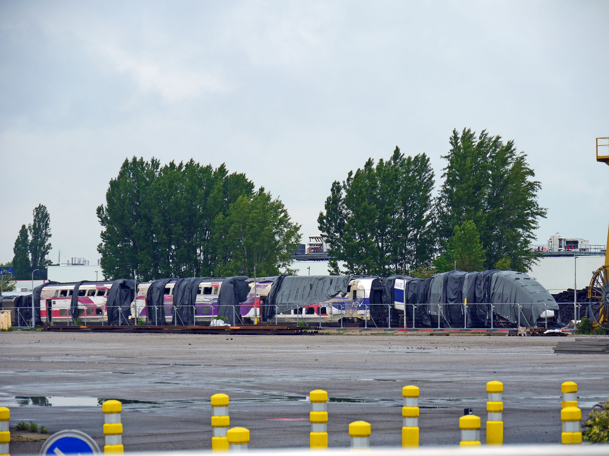 Épave de la rame TGV 744 stockée en gare de Strasbourg-Cronenbourg suite à l'accident d'Eckwersheim survenu le 14 novembre 2015.